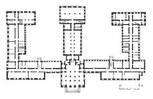 План галоўнага корпуса БНТУ